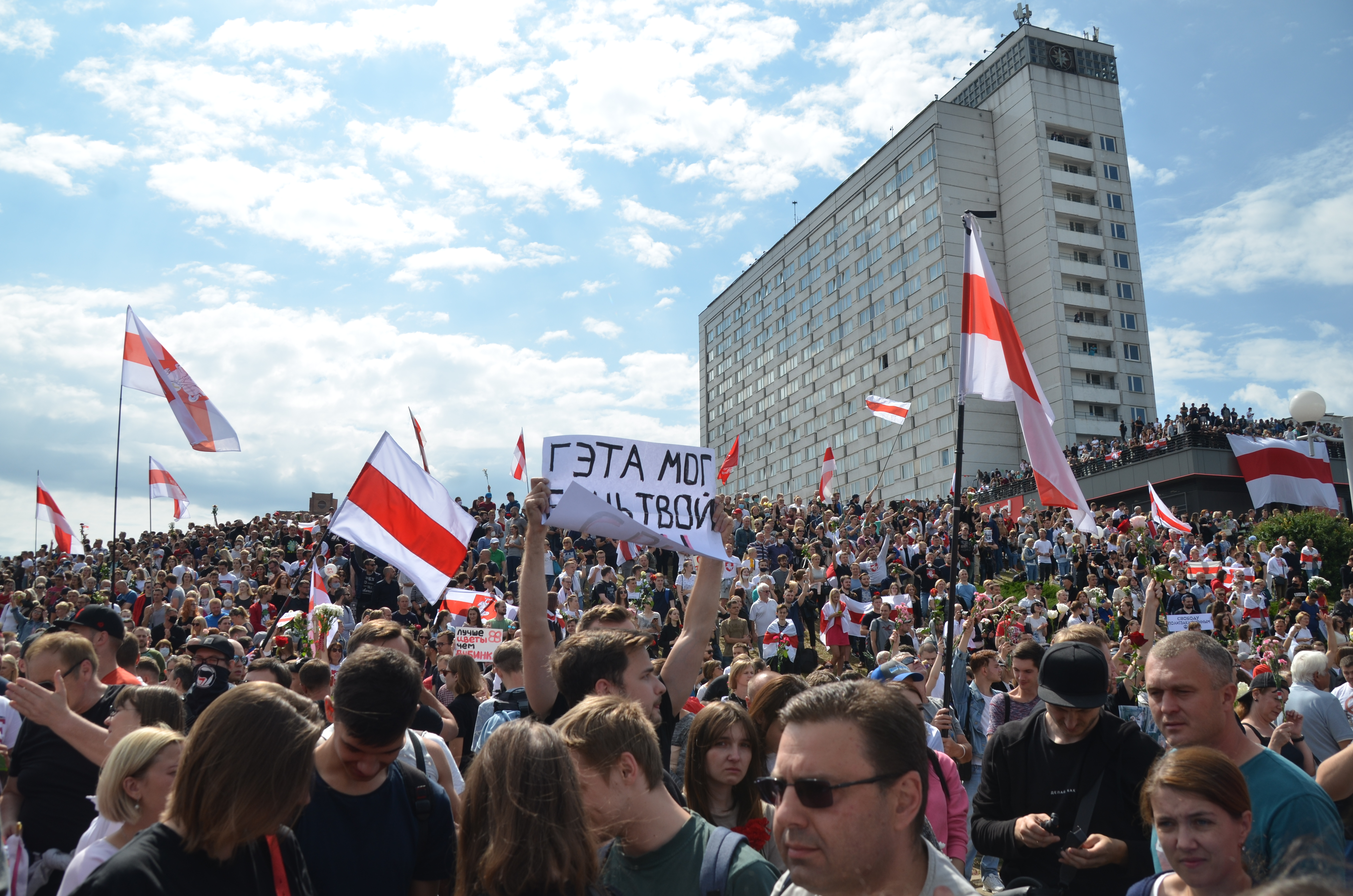 Митинг памяти Александра Тарайковского, метро Пушкинская, Минск, 15 августа 2020